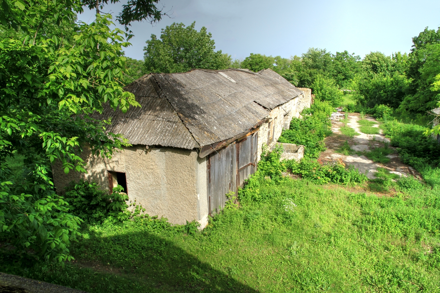 Куболтский парк, монумент природы, находится в Сынджерейский район, с. Куболта (код MD-SG-map-018)